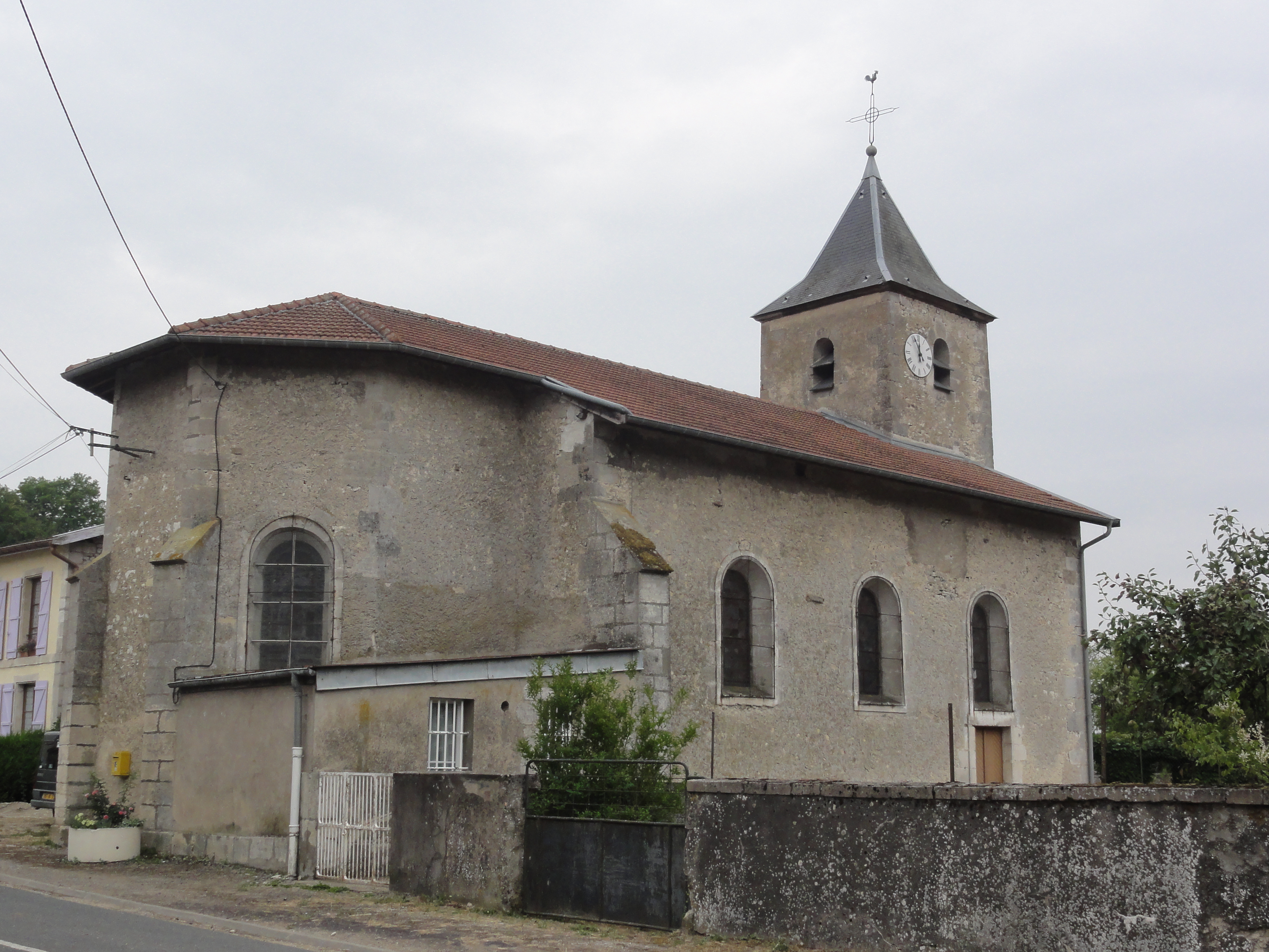 Jouy-en-Argonne (Meuse) église